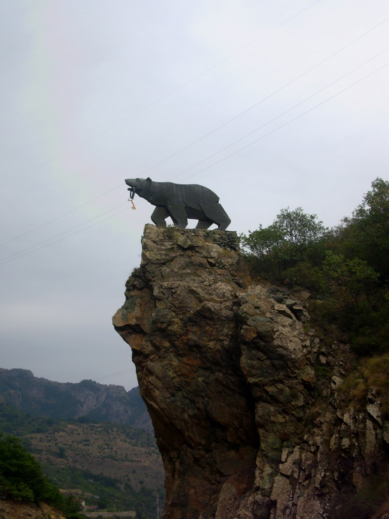 Քաջարանի բանալի. Կապան քաղաքում։ 1/3